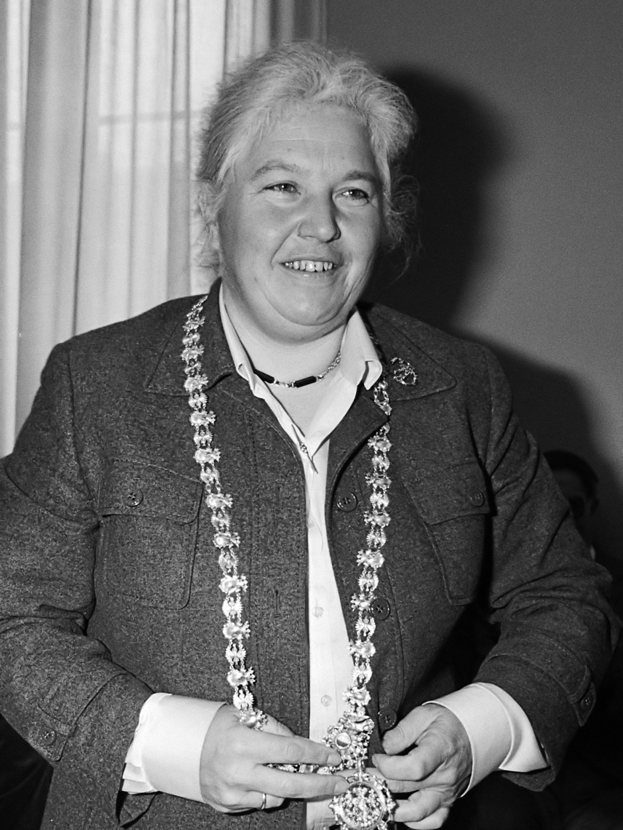 Mevrouw drs. Vos- van Gortel geinstalleerd als burgemeester van Utrecht, drs. Vos- van Gortel met de ambtsketen 2 april 1981